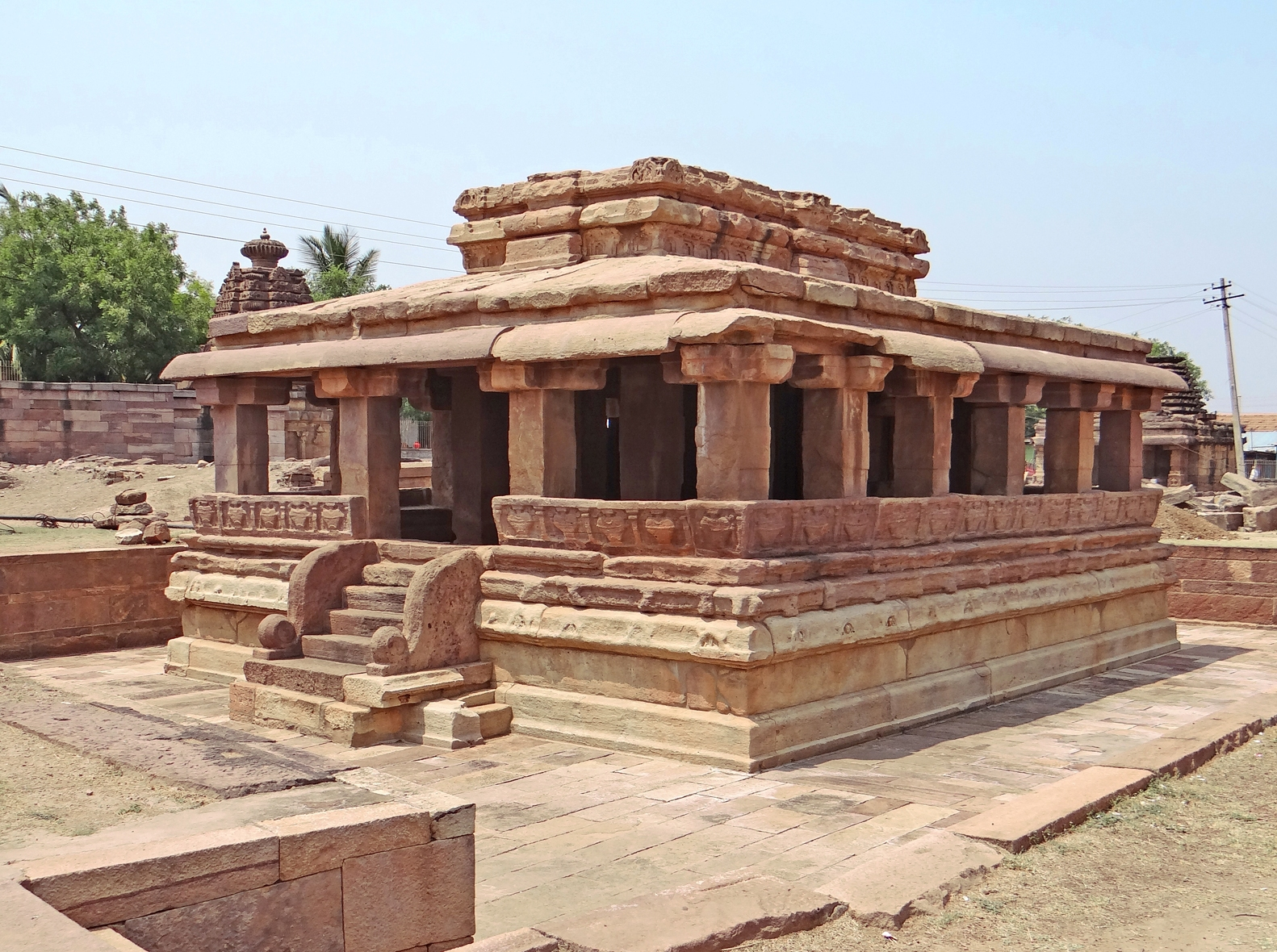 Le temple Gaudara Gudi (Temple Bhagwati) (Huchappayya gudi temple) le plus ancien de Aihole De forme primitive, il possède un toit de pierres plates, le tout est construit sur une plateforme. Le sanctuaire, entouré de 16 piliers, est au centre de l'édifice. Aihole était le principal centre de commerce du royaume Chalukya, ce temple aurait pu être celui de la guilde des commerçants. Aihole dans le Karnataka occupe une place unique dans l'histoire de l'architecture religieuse de l'Inde. Sous la dynastie des rois Chalukya (450-750 A.D.), cette ville, la première capitale du royaume, a été un lieu d'expérimentation pour la construction des premiers temples maçonnés. Ces temples ont succédé aux sanctuaires rupestres, creusés dans le rocher. Aihole est ainsi le berceau de l'architecture du nord (style nagara) et du sud (style dravidien) Le site compte près de 150 temples hindous et jaïns dont certains ne sont pas terminés par les artisans constructeurs qui y apprenaient les techniques de construction et de sculpture. Articles de Wikipedia sur Aihole et le temple de Durga